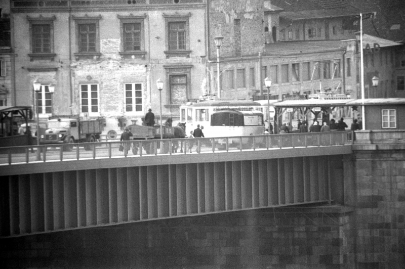 Die sowjetische Zonengrenze am Urfahraner Brückenkopf der Linzer Nibelungenbrücke. Blick aus dem Hotel Linzerhof